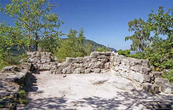 Pozůstatky skalního hrádku na vrcholové plošině vyhlídky Winterstein autor:Zp